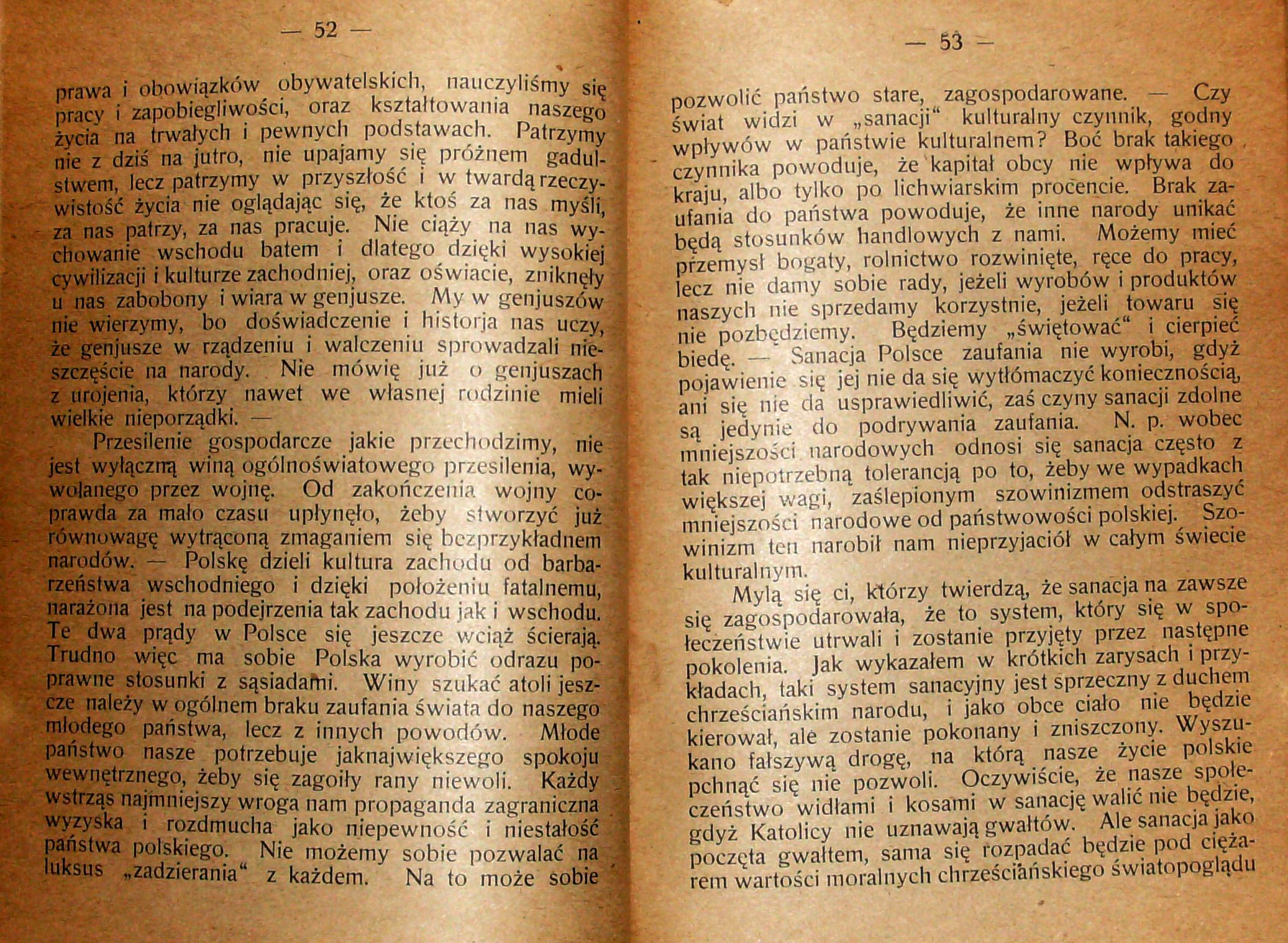 Stanisław Krzyżowski, Rozmyślania w czterdziestą rocznicę encykliki „Rerum novarum”, wydanej 15 maja 1891 r. przez papieża Leona XIII, Pszczyna 1931